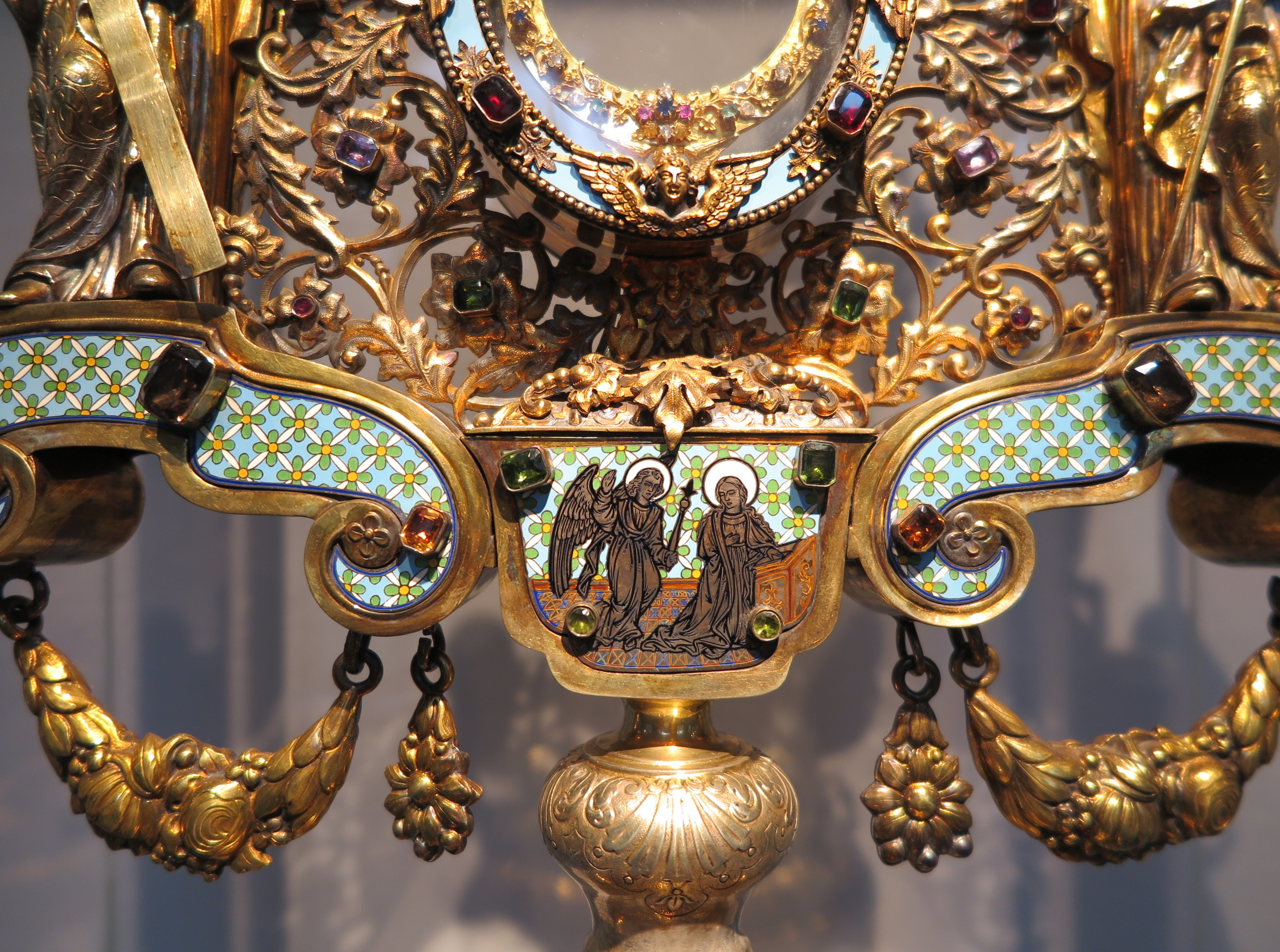 Unterer Bereich der Barockmonstranz.